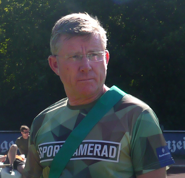 Brigadegeneral Ralf Hoffmann beim jährlichen Sportfest des Betriebszentrums IT-Systeme der Bundeswehr 2019.